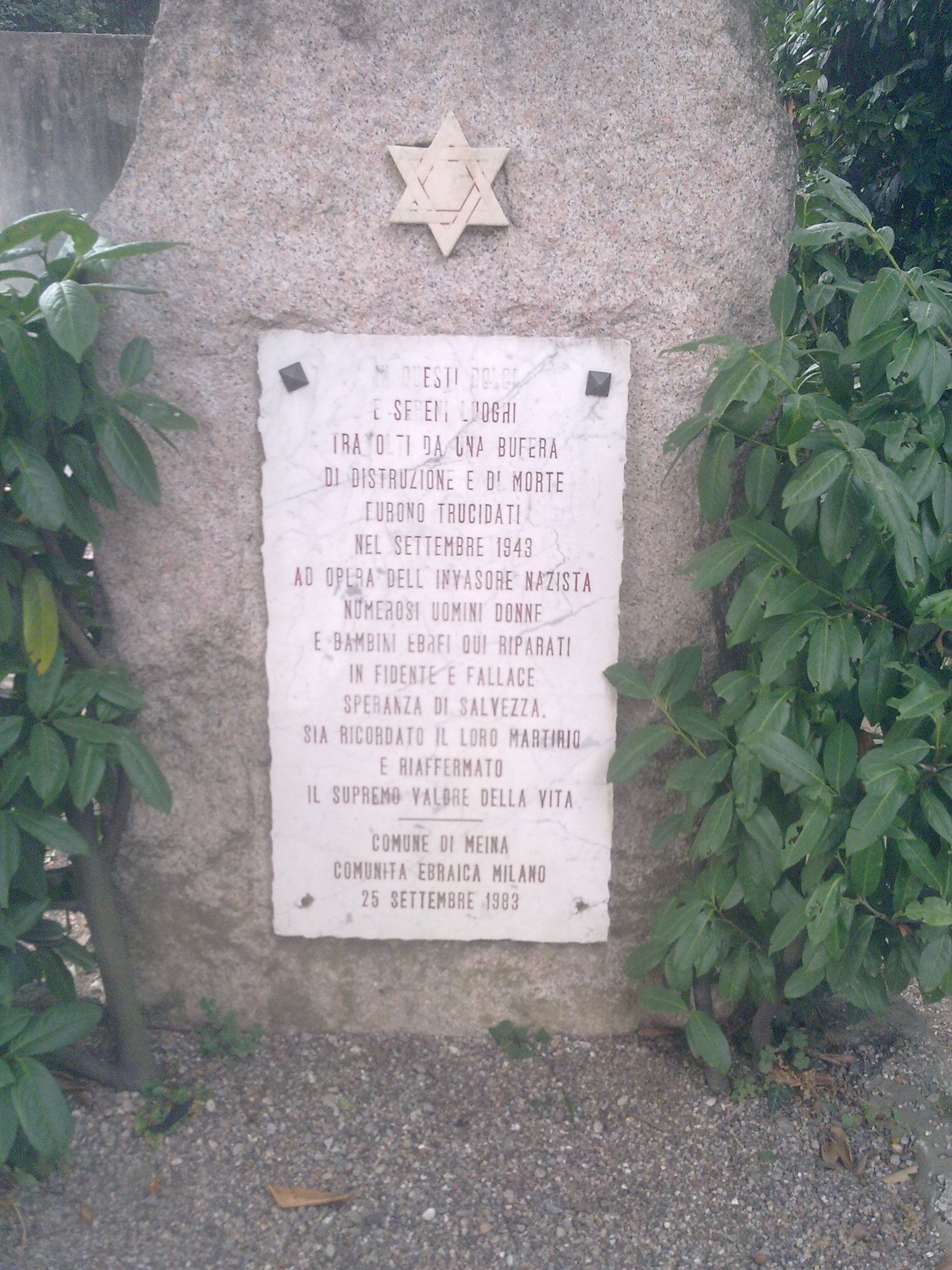 Denkmal für die von der deutschen Waffen-SS EInheit, 1. SS-Panzer-Division Leibstandarte-SS Adolf Hitler ( auf dem Denkmal als Nazifasciti benannt ), in der Nacht vom 22./23. und 23./24. September 1943 ermordeten Juden, die im Hotel Meina untergebracht waren. Errichtet am 25. September 1983 von der Jüdischen Gemeinde Mailand und der Commune Meina